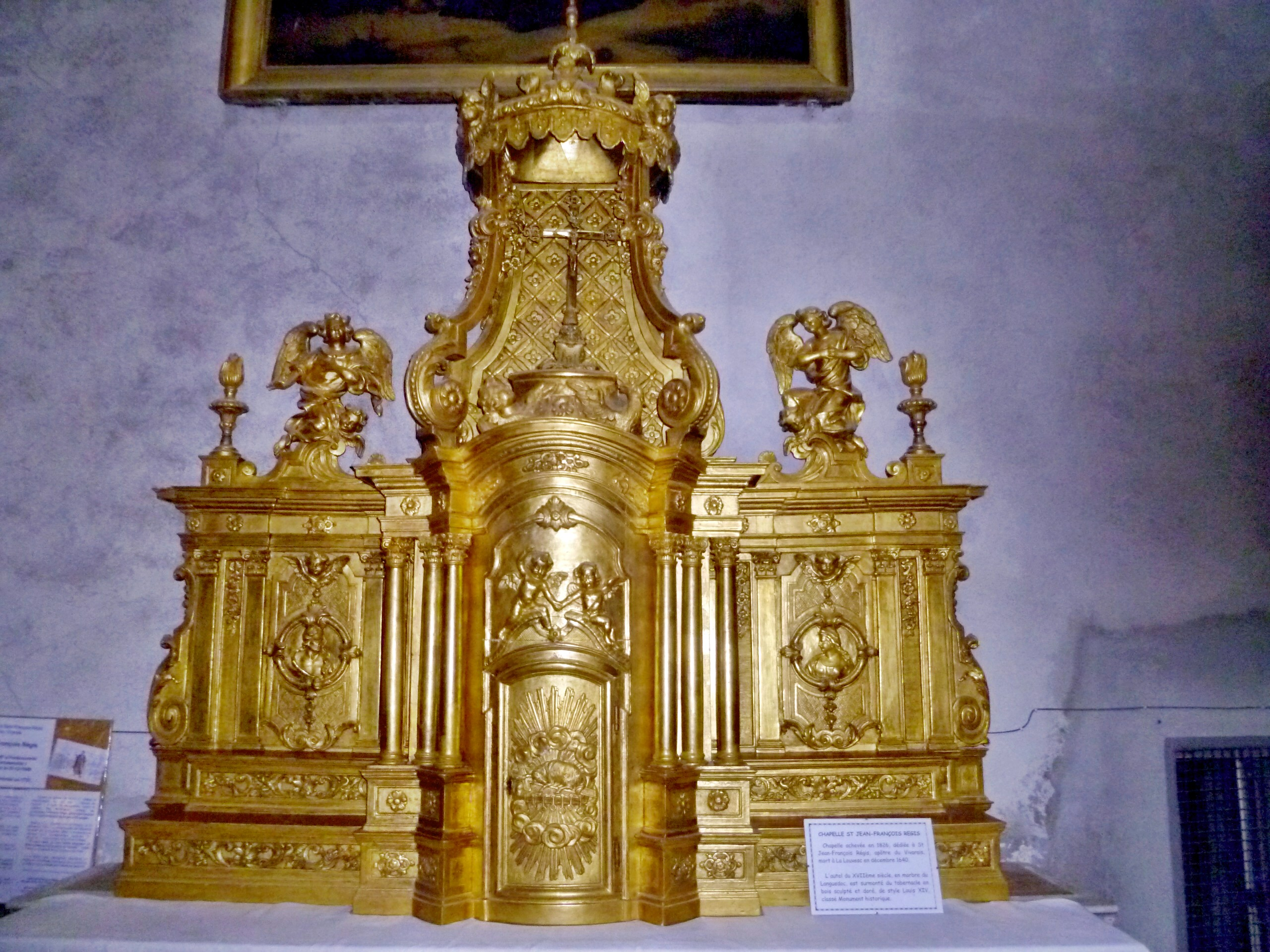 Tabernacle en bois doré, chapelle Saint-Régis; église Saint-Pierre de Joyeuse, France.